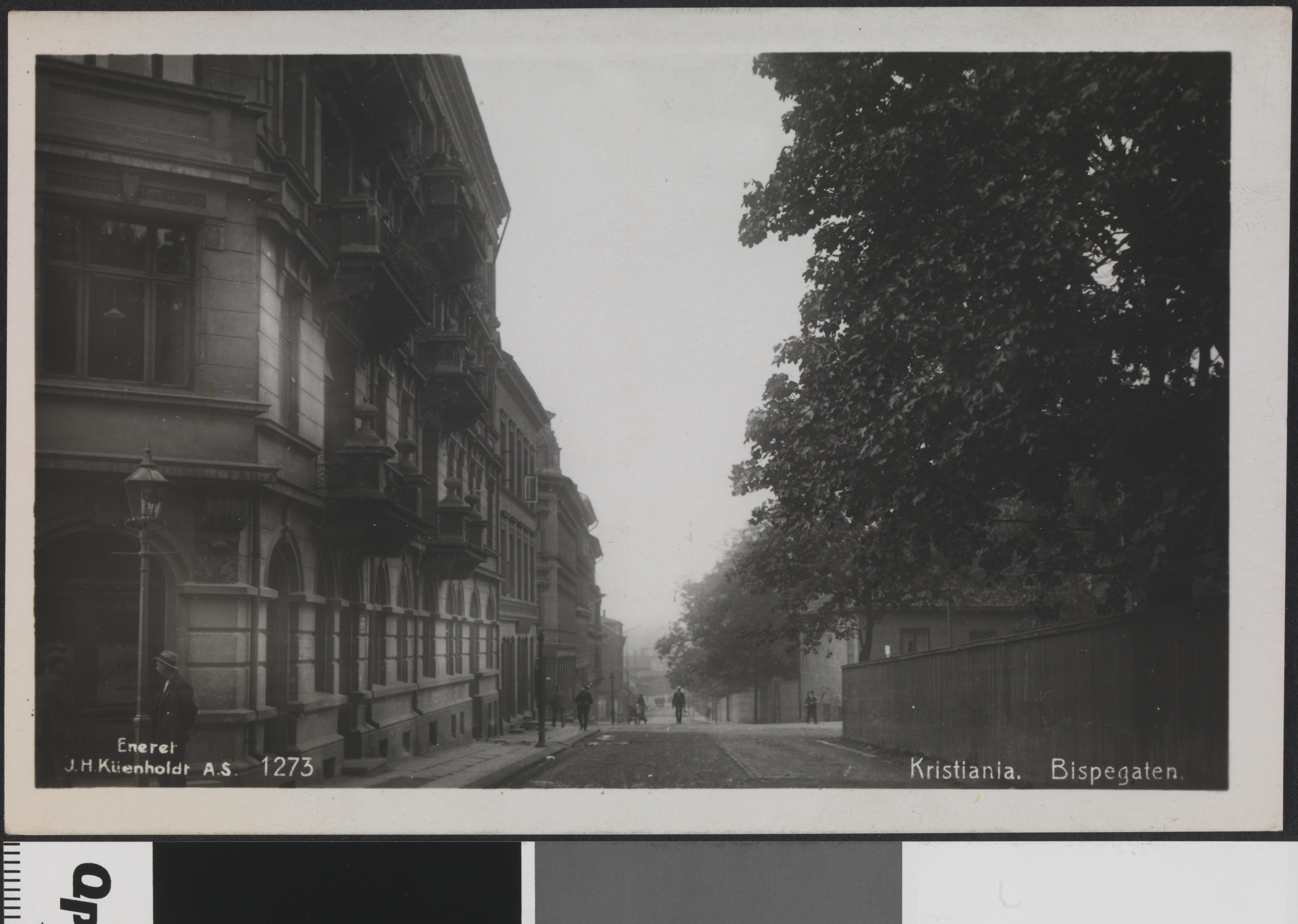 Bildet er hentet fra Nasjonalbibliotekets bildesamling